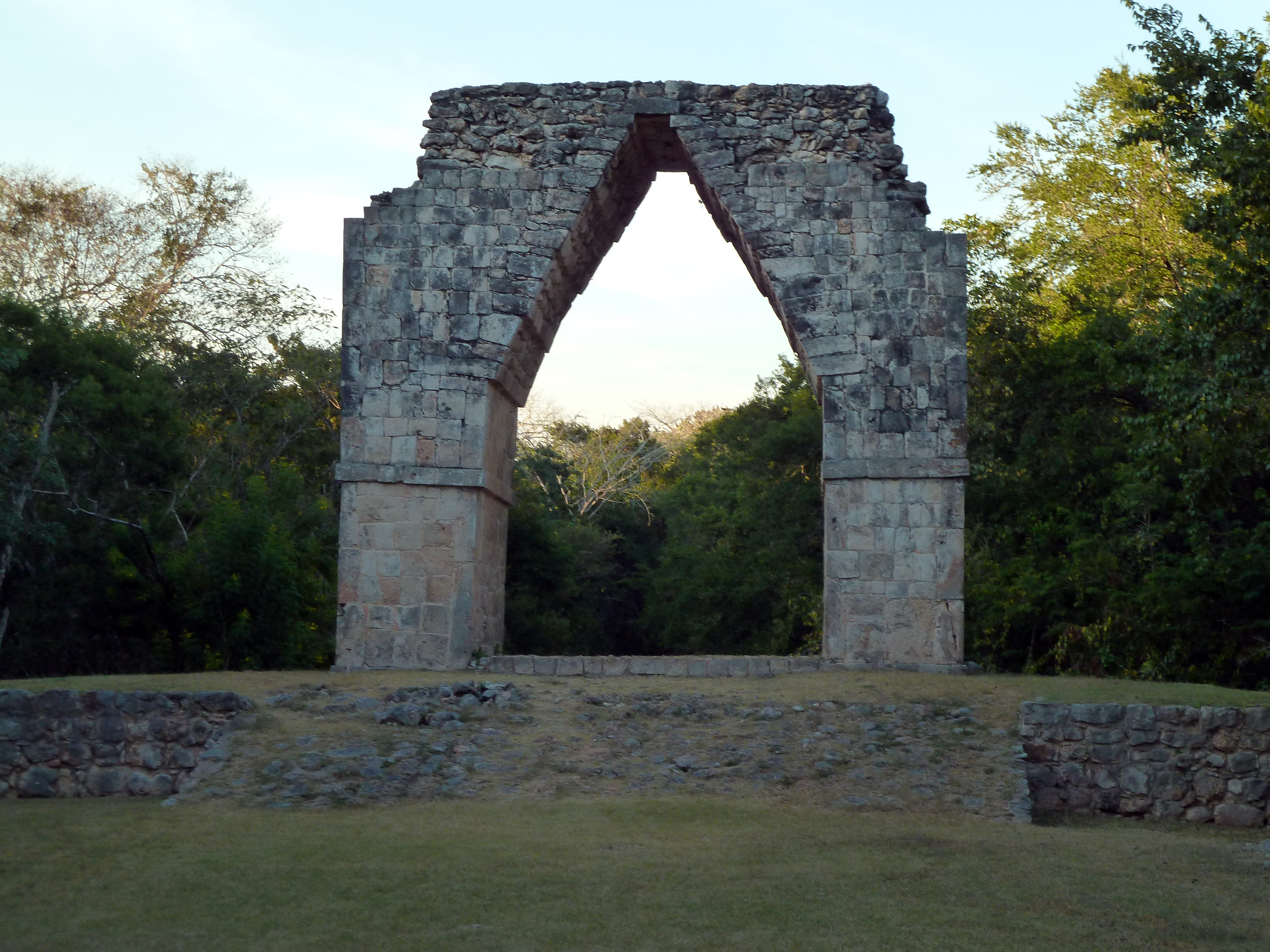 Day 10: Kabah